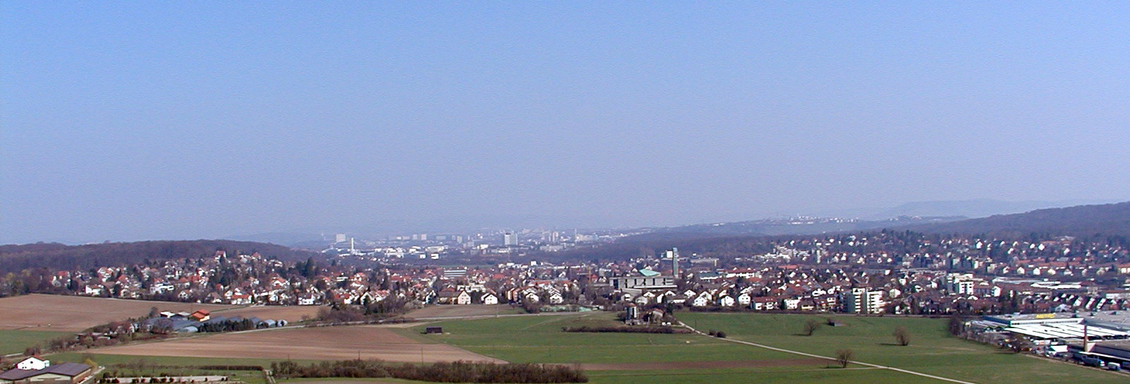 Korntal vom "Grünen Heiner" aus gesehen